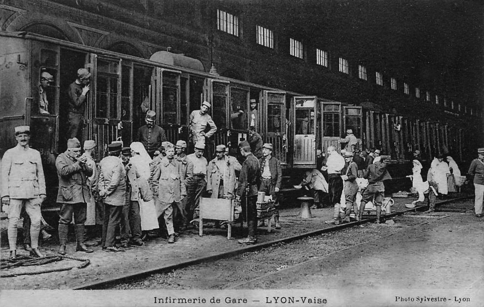 Intérieur de la grande halle, de la gare de Lyon-Vaise, transformée en infirmerie de 1914 à 1918.